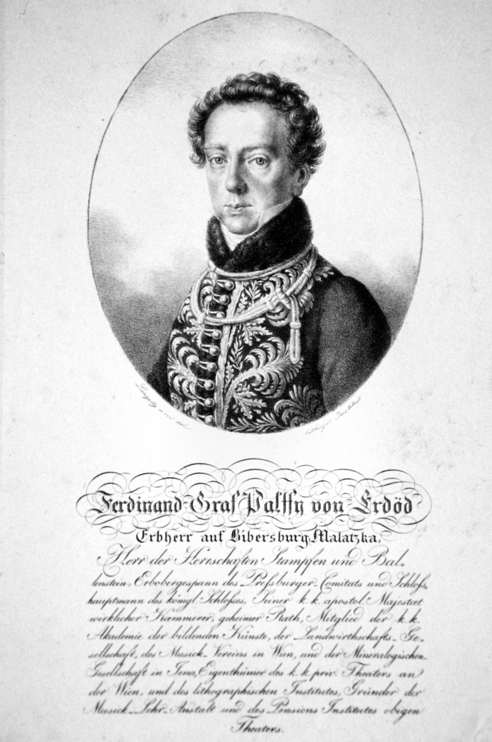 Ferdinand Graf von Palffy-Erdöd (1774-1840), Bergbauexperte, Besitzer und Direktor des Theaters an der Wien, Unternehmer. Lithographie von Josef Lanzedelli d. Ä., ca. 1820